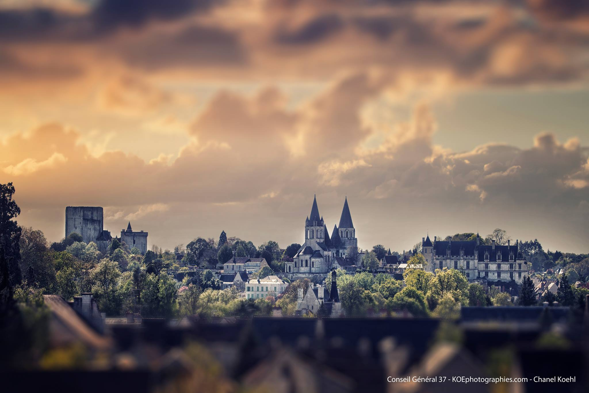 Cité Royale de Loches, avec le donjon, la collégiale Saint-Ours et le logis royal